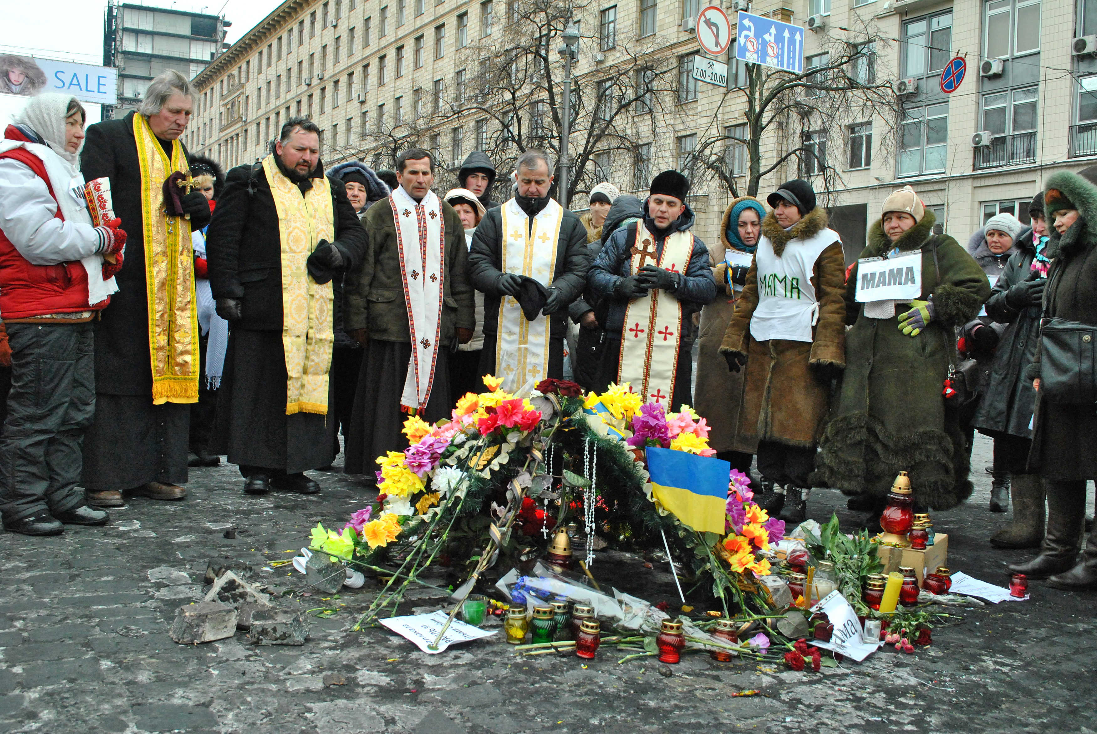 Молитва біля тимчасового меморіалу загиблим під час сутичок на вул. Грушевського в Києві.